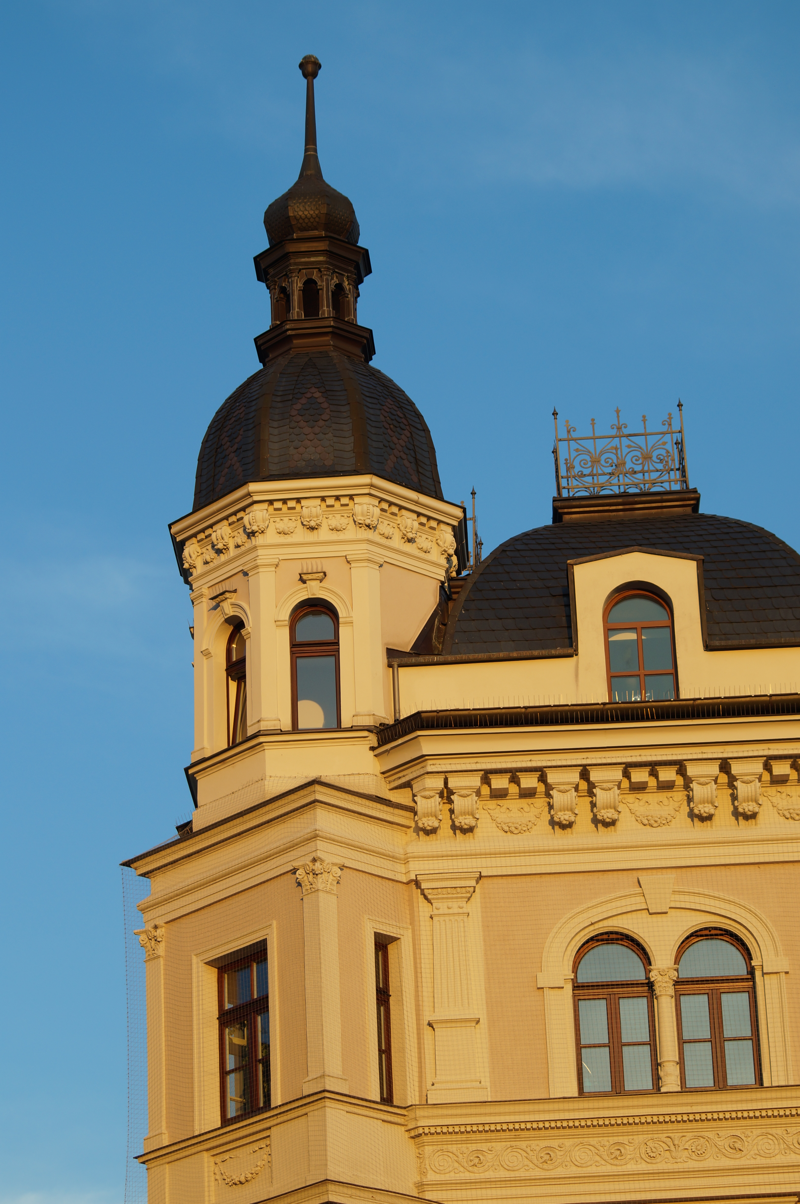 Ehem. Verlagshaus, viergeschossiger palastartiger Eckhauskomplex mit Walmdach, beide Straßenfronten gegliedert durch Risalite, an der Ecke Schrägerker mit Kuppelturm, in Formen der französischen Renaissance, 1893/94 (Nr.2) und 1895 (Nr.4) von Alois Janker. This is a photograph of an architectural monument.